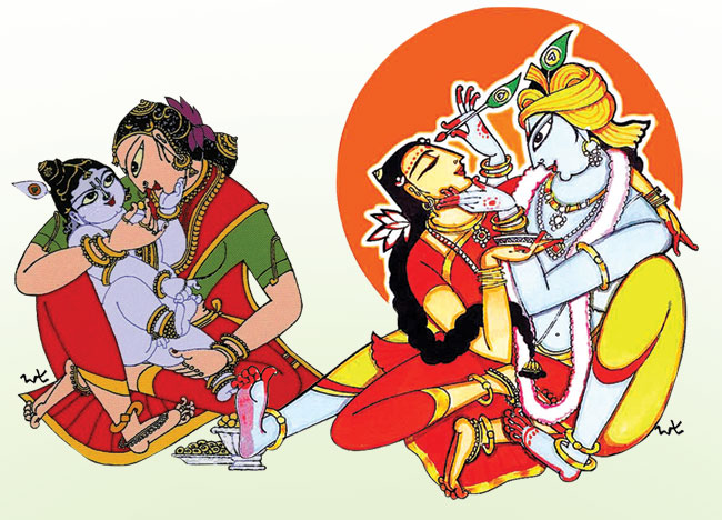 అల్లరి కన్నయ్య